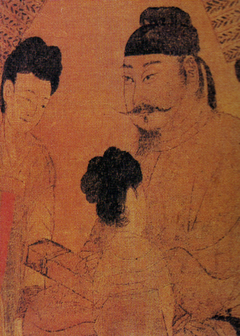 Emperor Taizong